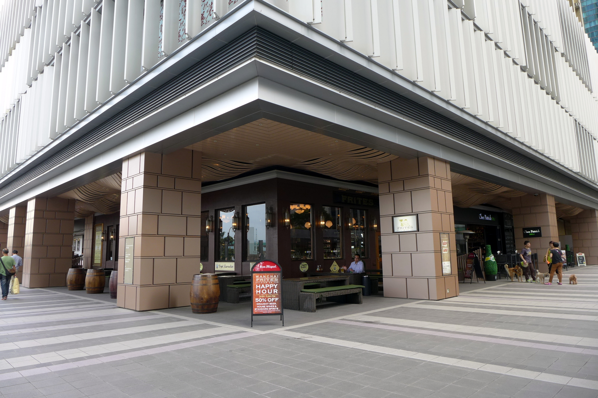 Causeway Centre Restaurants